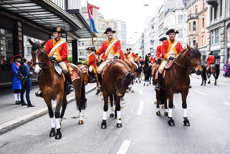 Zunft St. Niklaus, Kyburger Dragoner, Fotografin Renée Erdin